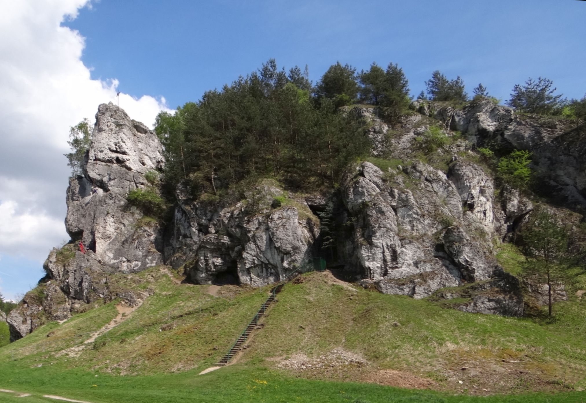 Dolina Kobylańska. Żabi Koń